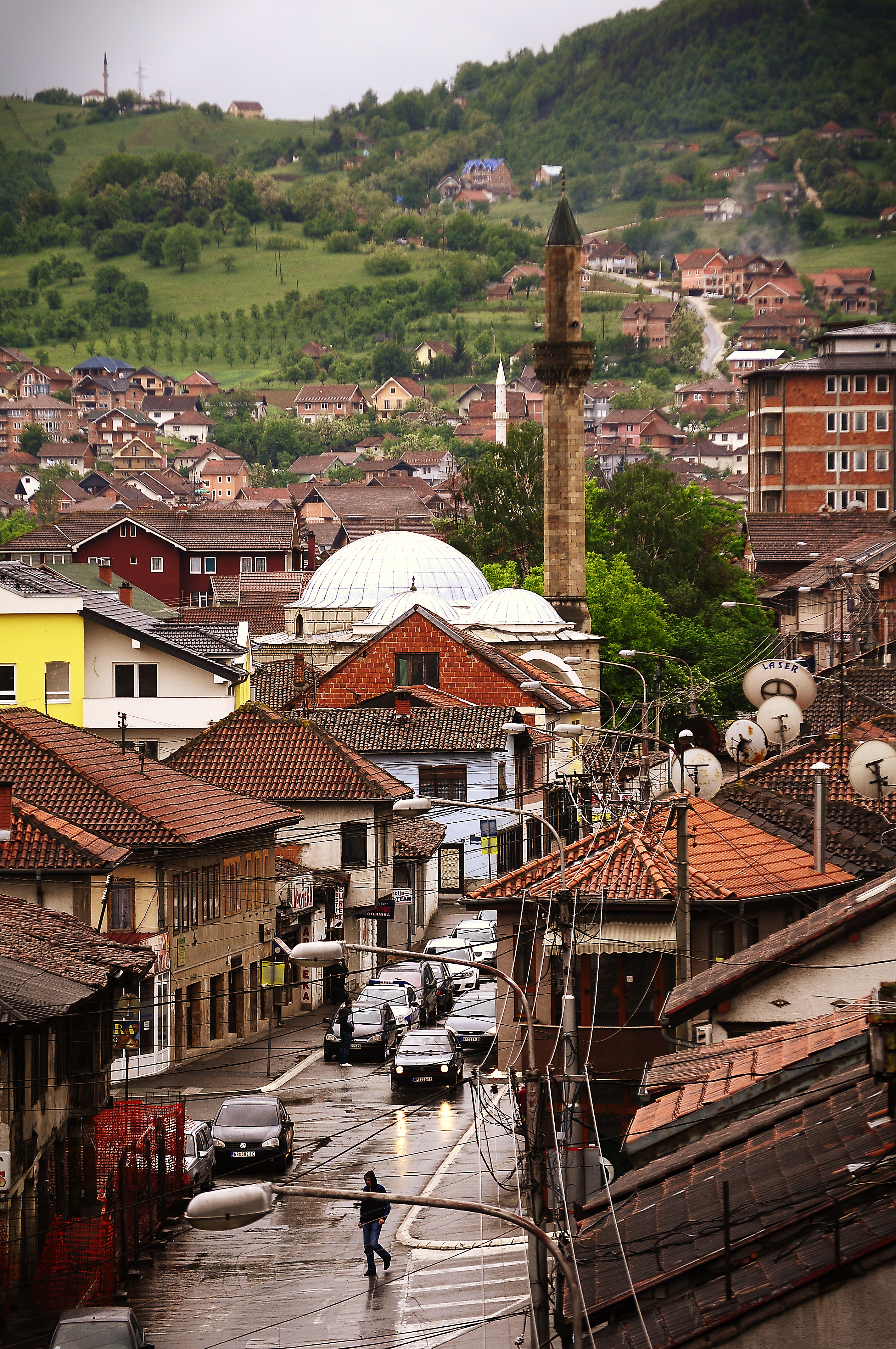 Prvomajska ulica sa pogledom na Altun-alem džamiju